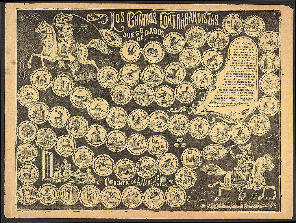 Litografía de Antonio Vanegas Arroyo: Los Charros Contrabandistas 1890-1917